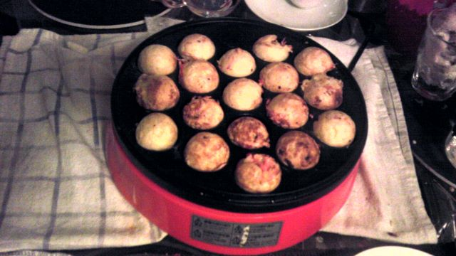 電気式たこ焼き器での調理例